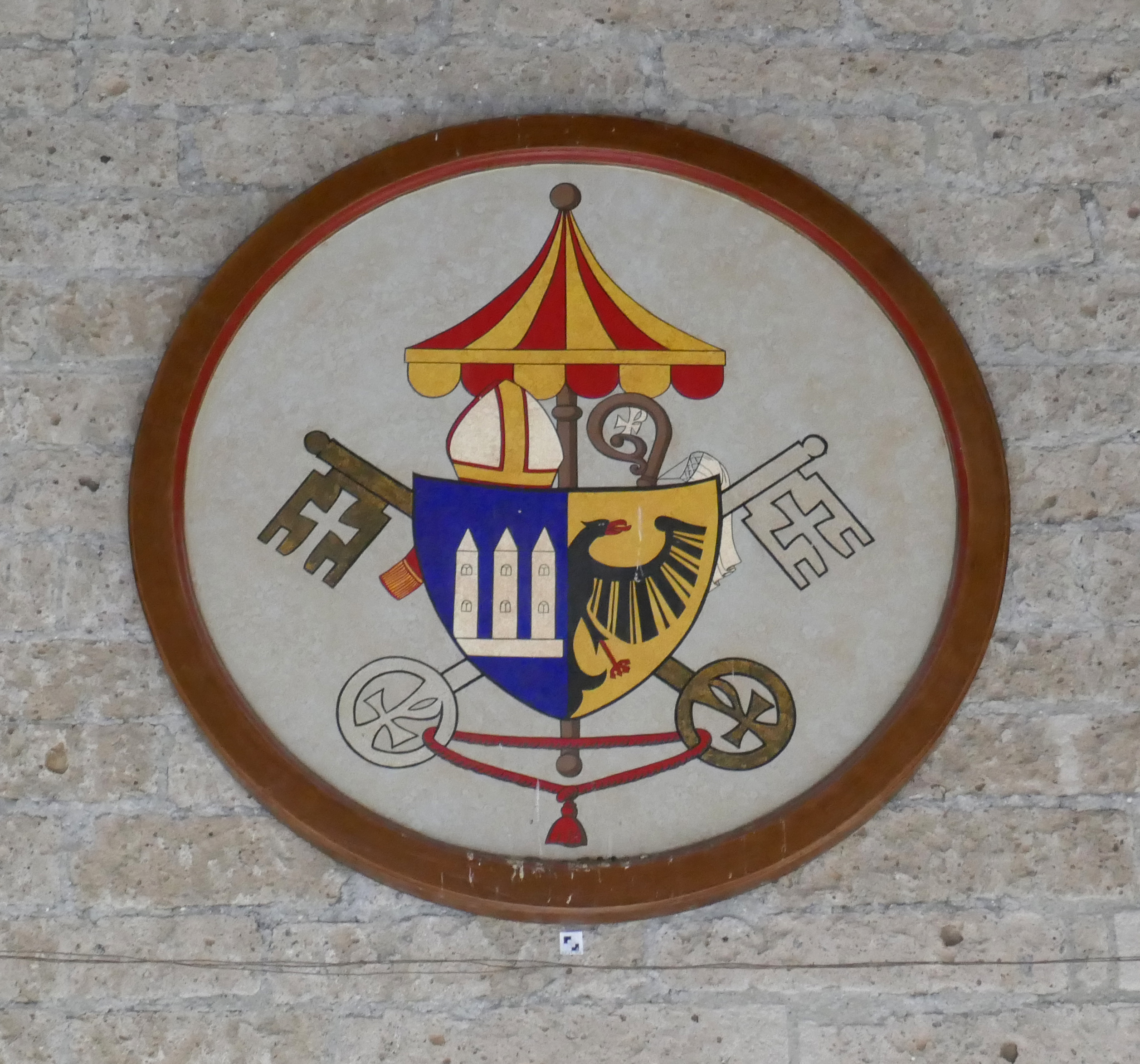 Abtei Maria Laach, Klosterkirche.